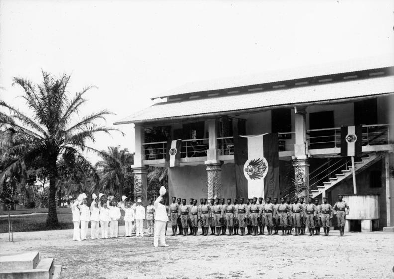 Kamerun, Duala, Polizeitruppe Duala Polizeitruppe: "Hoch!" an Kaisers Geburtstag [Kamerun, Duala, Polizeitruppe vor dem Polizeigebäude, Hochrufe anlässlich des Geburtstags Kaiser Wilhelm II., Reichsdienstflagge am Gebäude]